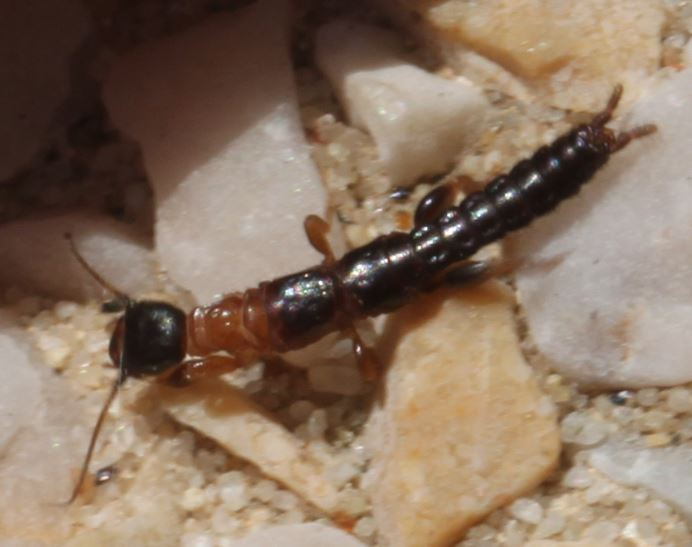 Weibchen von cf. Haploembia solieri am 2. Juli 2018 an der Côte d’Azur